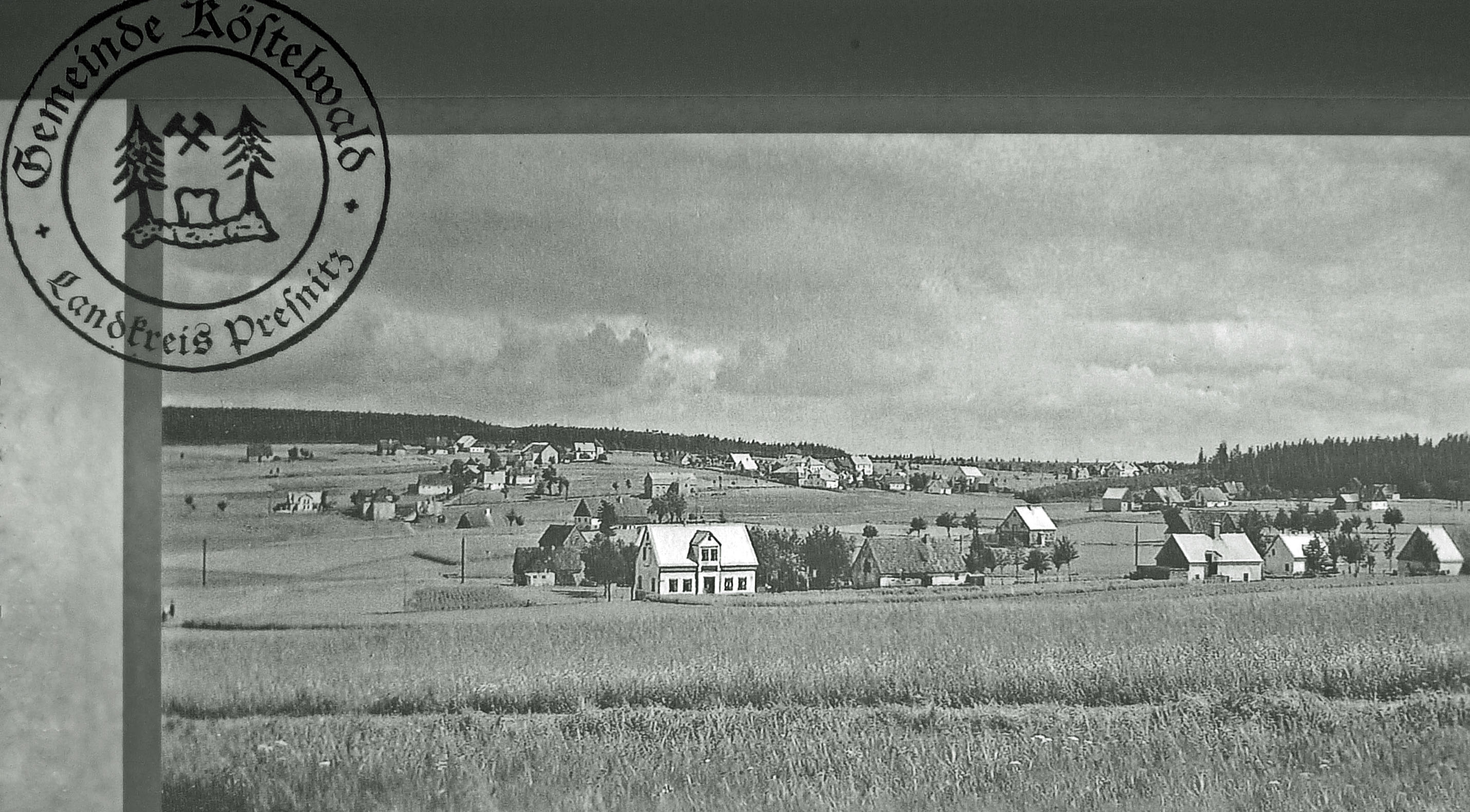 Historische Ansicht von Köstelwald (um 1930)